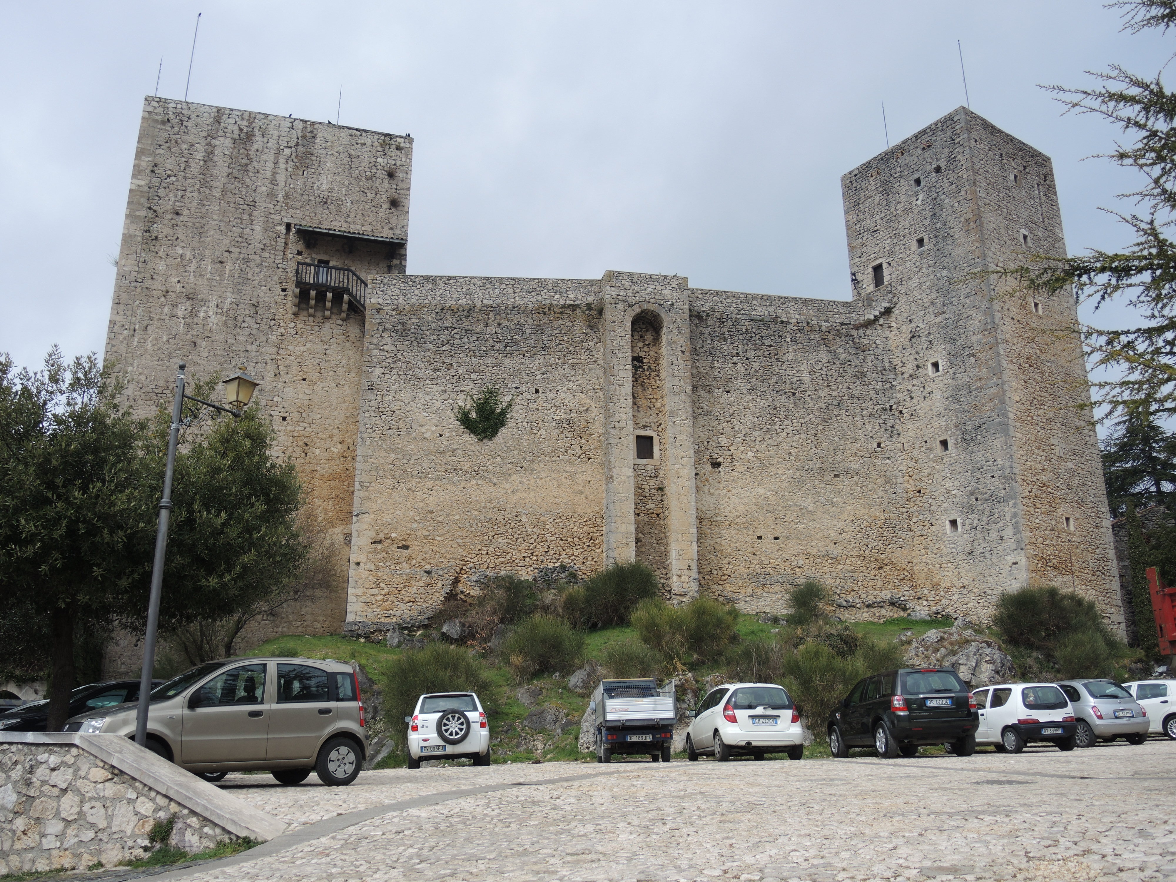 Pereto